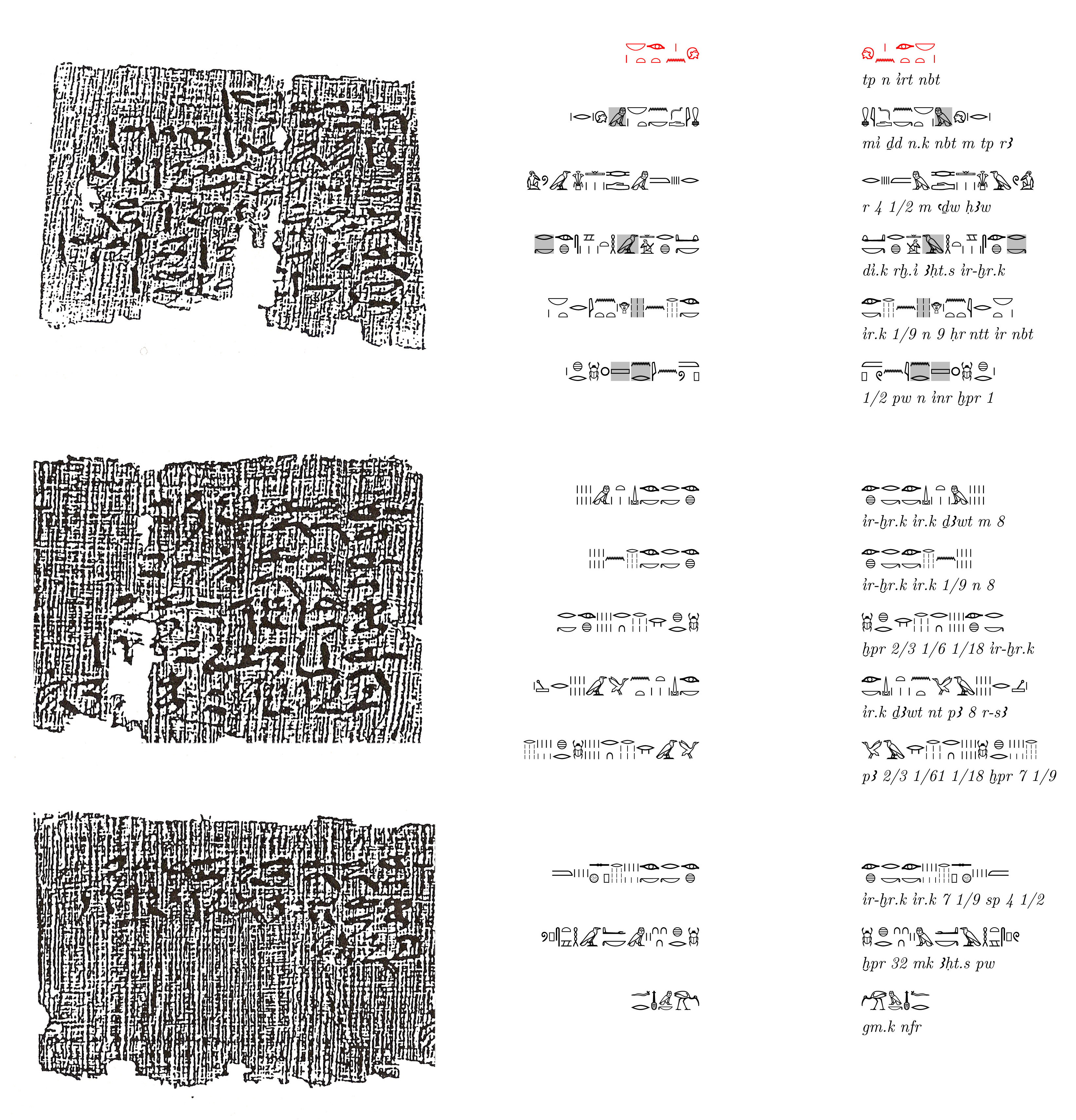 Problème M10 du Papyrus de Moscou. à gauche, le texte en hiératique ; Au centre, transcription du texte en hiéroglyphes ; à droite, inversion des signes et translittérations.